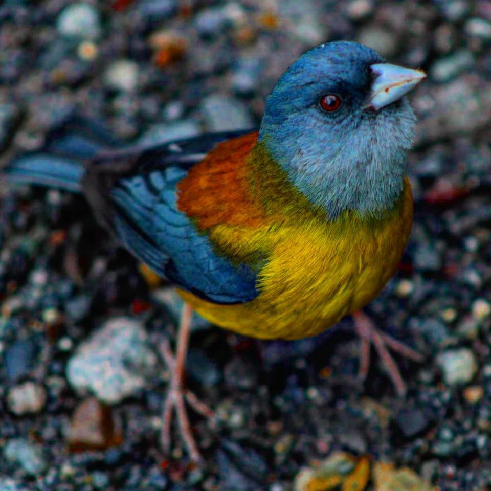 Parque nacional Vicente Pérez Rosales